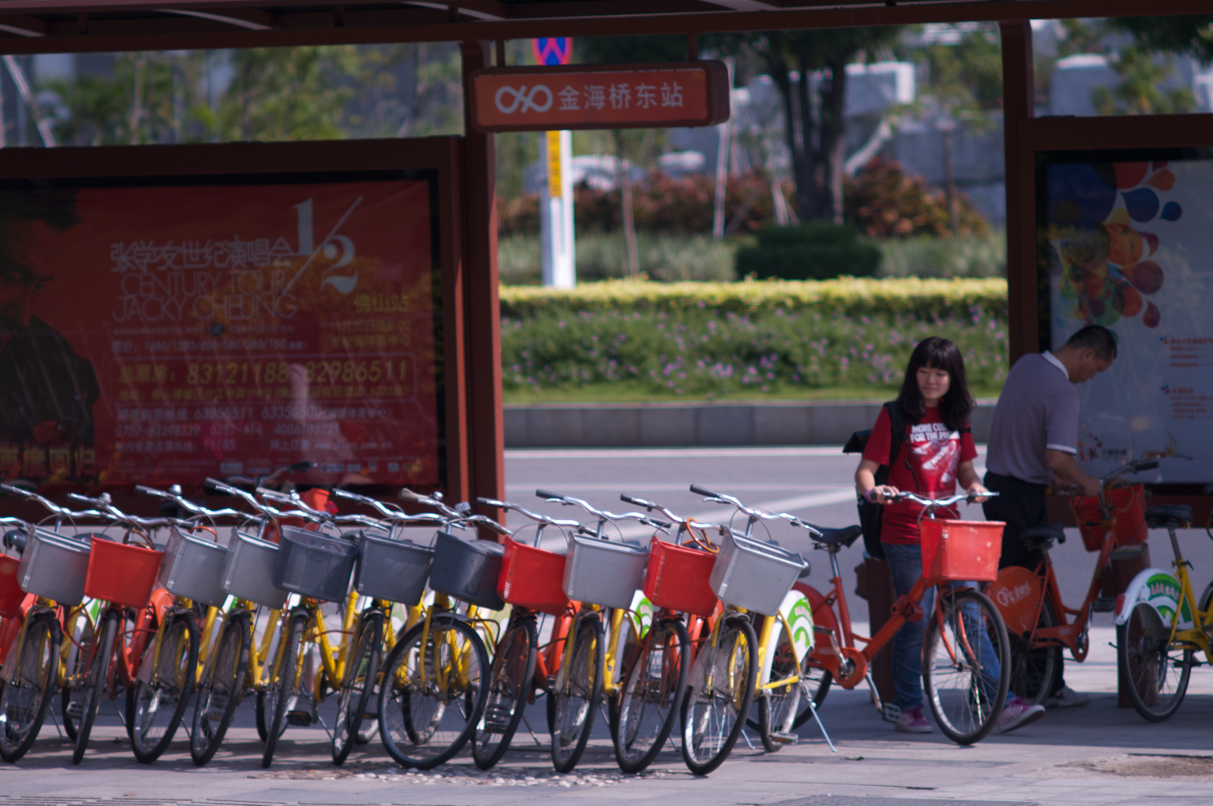 桂城公共自行车的一个站点